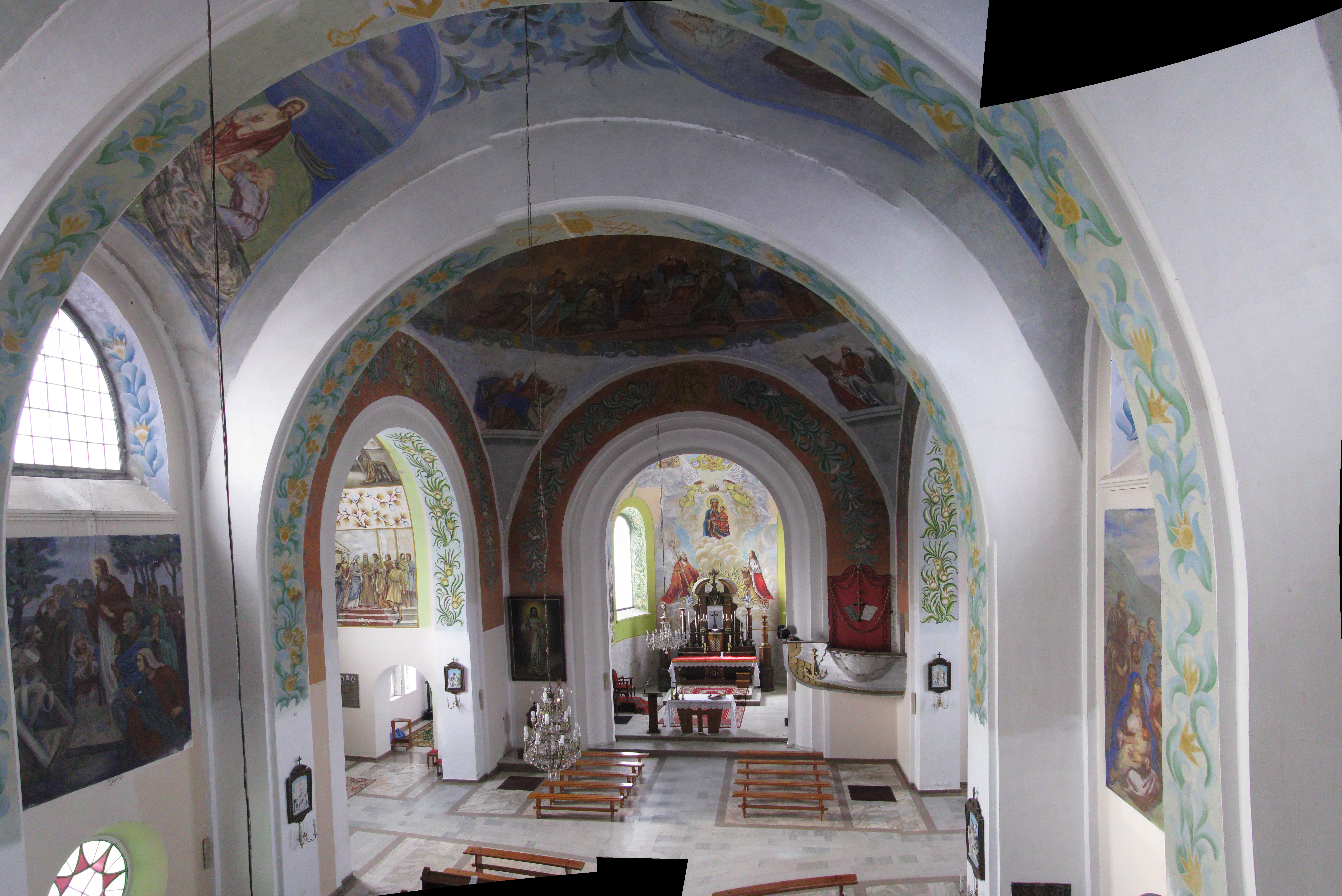 Беларуская (тарашкевіца): Касьцёл Маці Божай Ружанцовай. в. Солы This is a photo of Belarusian heritage monument. Reference number: 412Г000713 ( WLM)